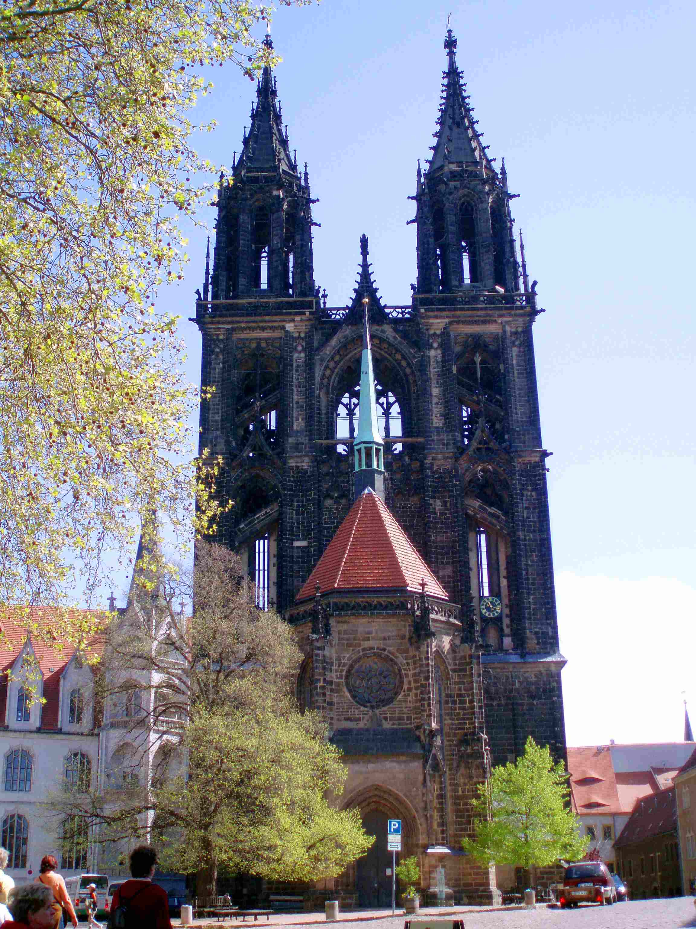 Dom zu Meißen